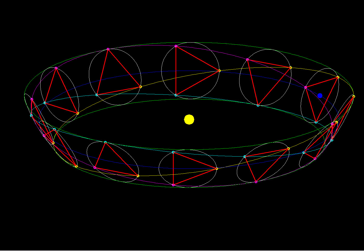 Orbites des satellites de LISA